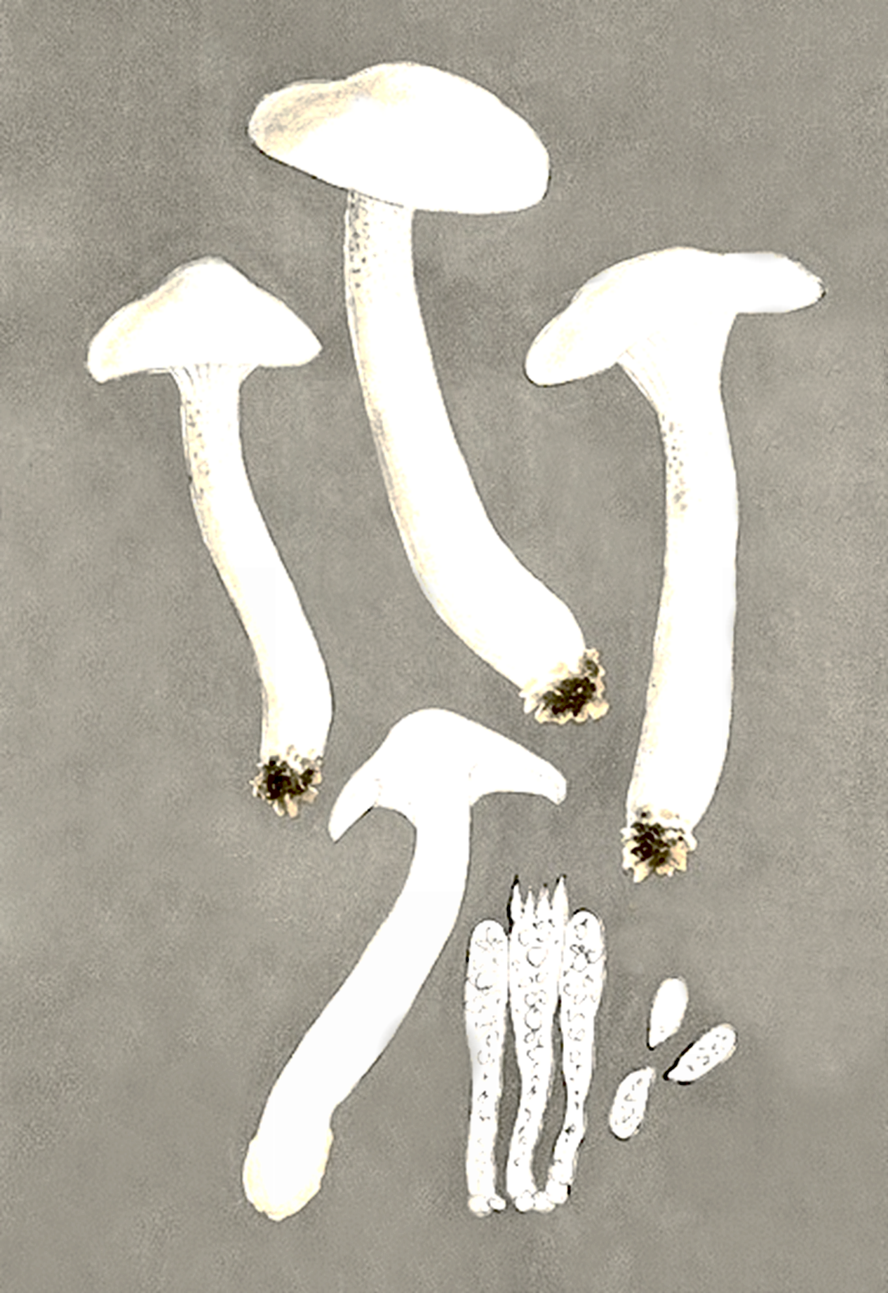 Giacomo Bresadola: Hygrophorus eburneus (Bull.) Fr. (1838)